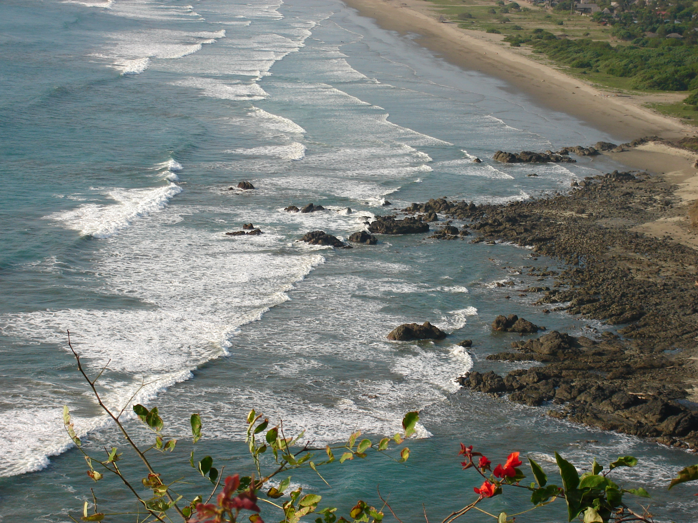 Playa Los Frailes en el Sur de Manabí.